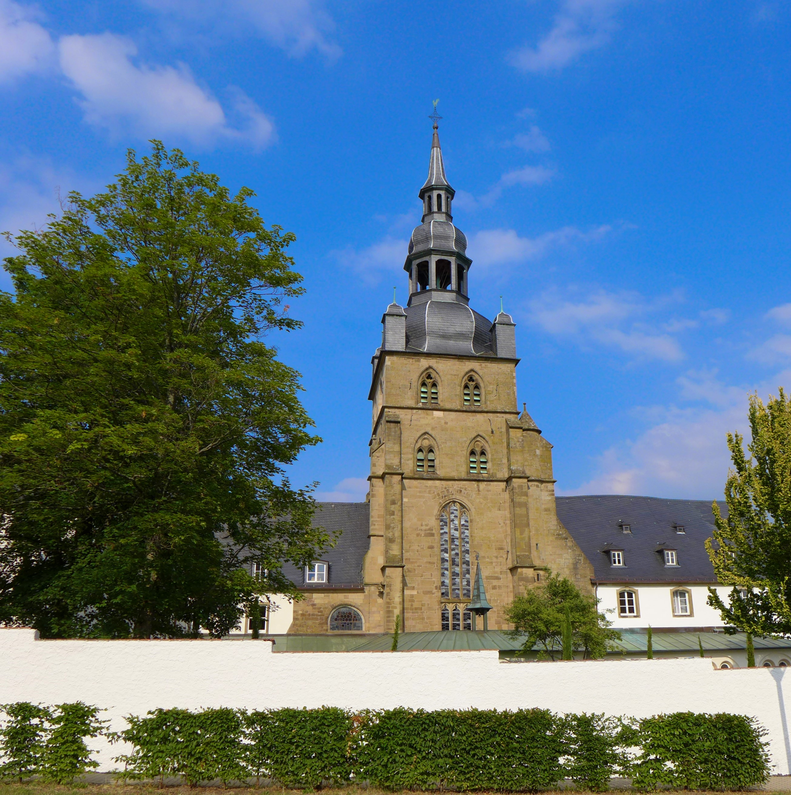 Benediktinerabtei St. Mauritius (Tholey), Turm der Abteikirche von Westen her